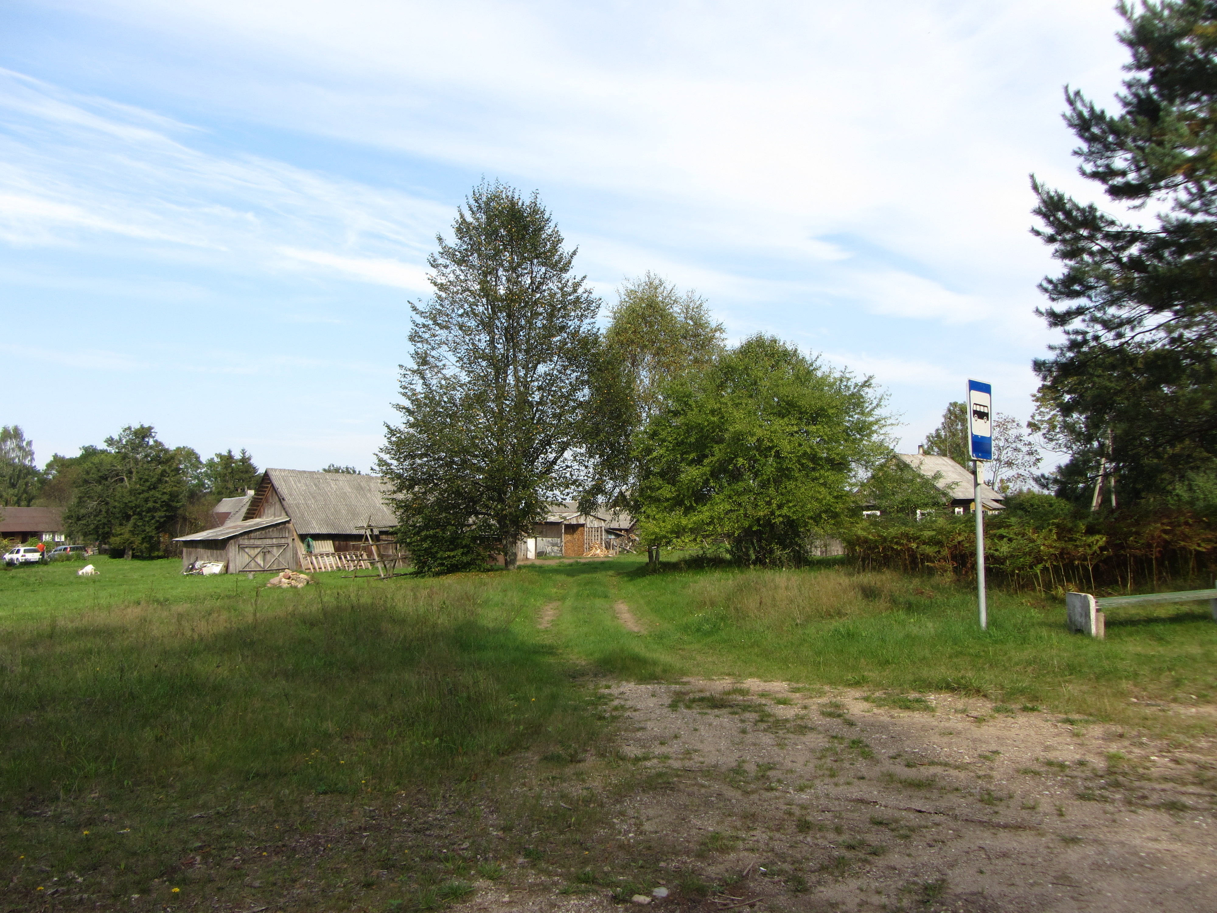 Pašekščiai 33344, Lithuania